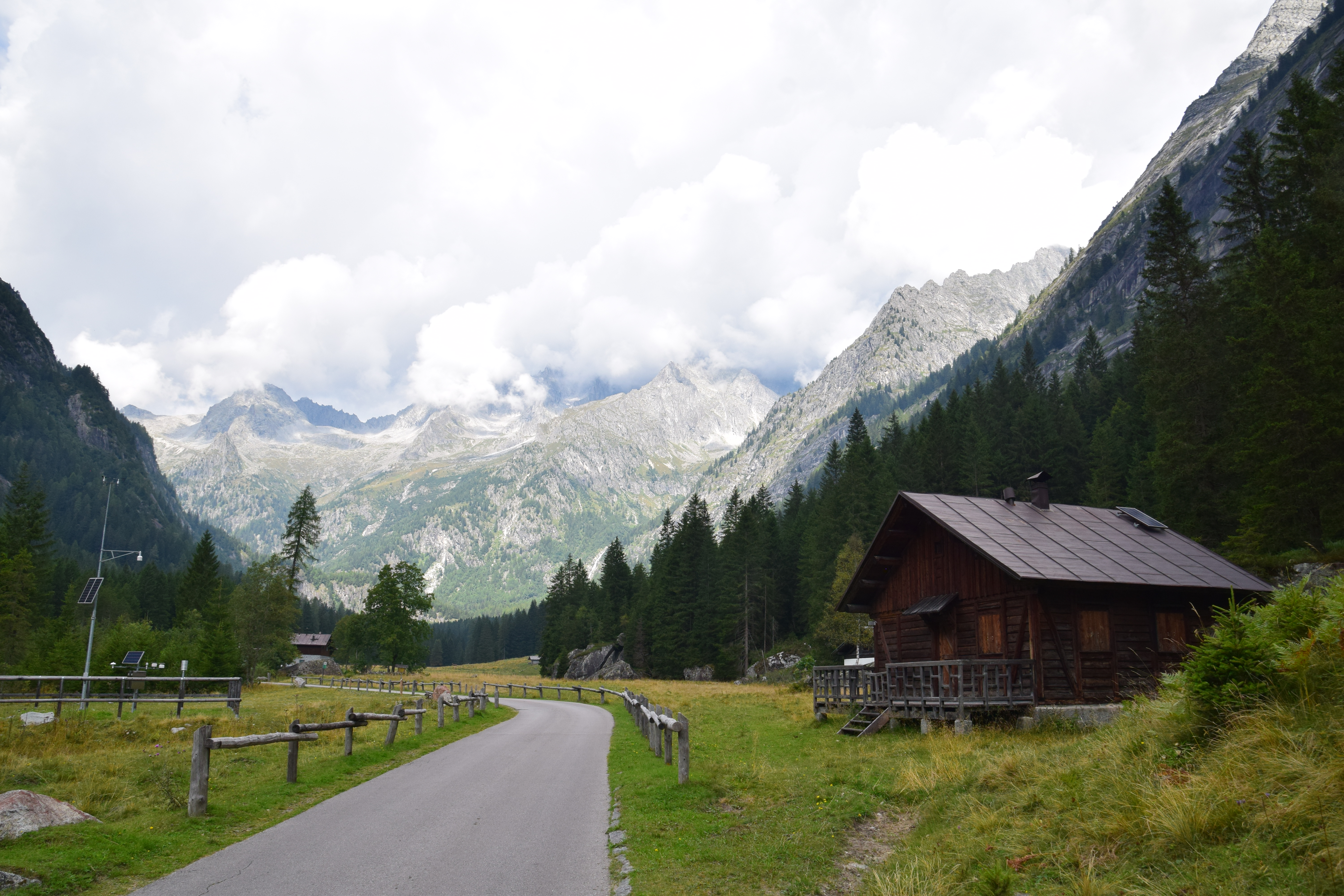 Parco naturale provinciale dell'Adamello-Brenta (Q769604)